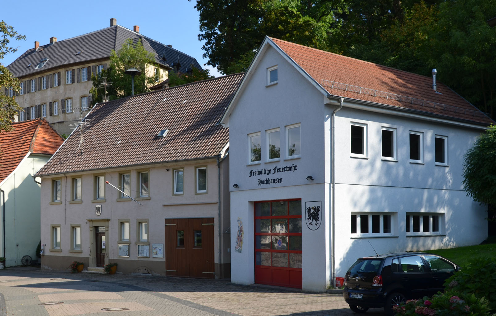 Rathaus und Freiwillige Feuerwehr in Haßmersheim-Hochhausen, im Hintergrund das Schloss.